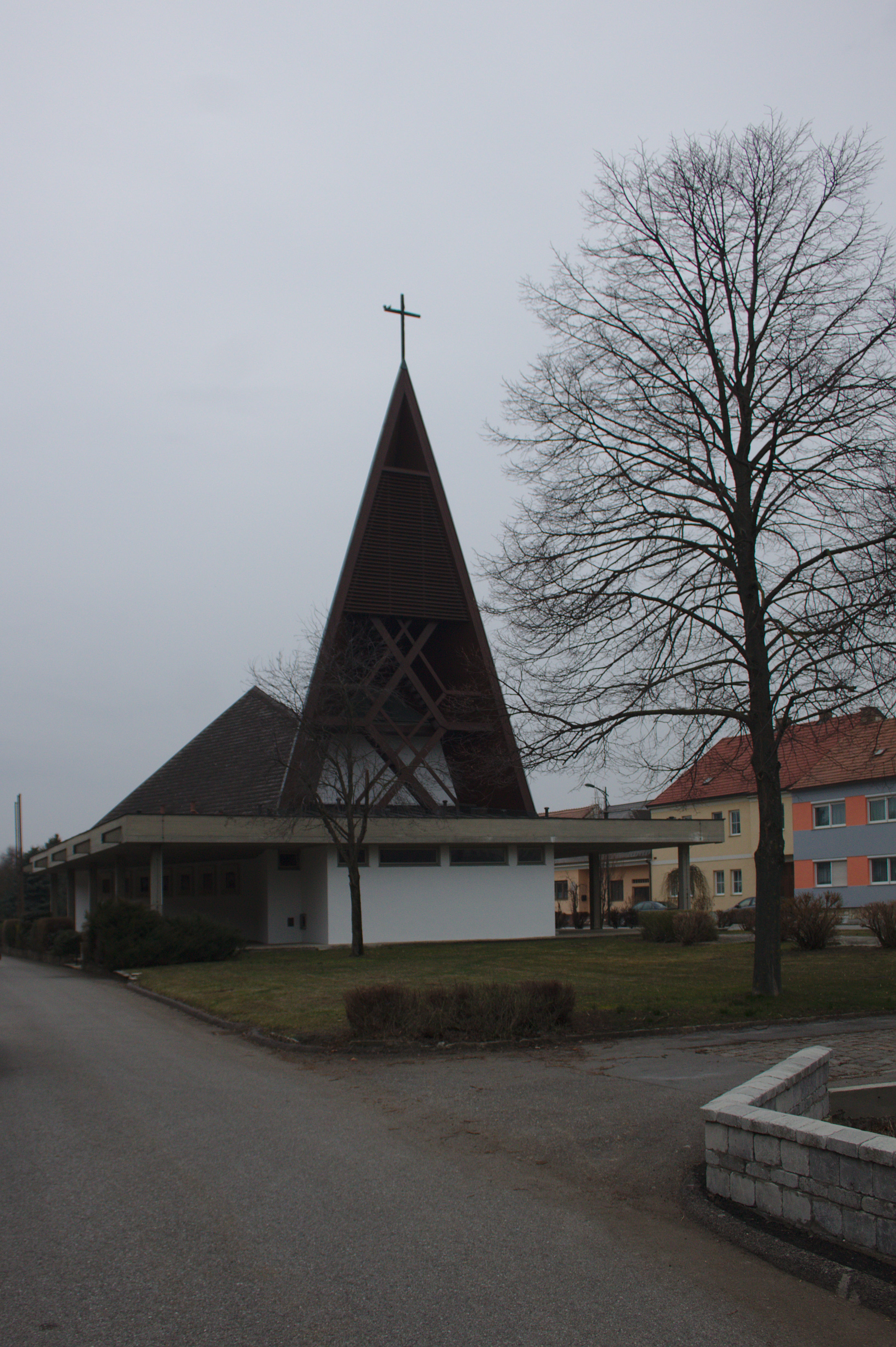 Aderklaa